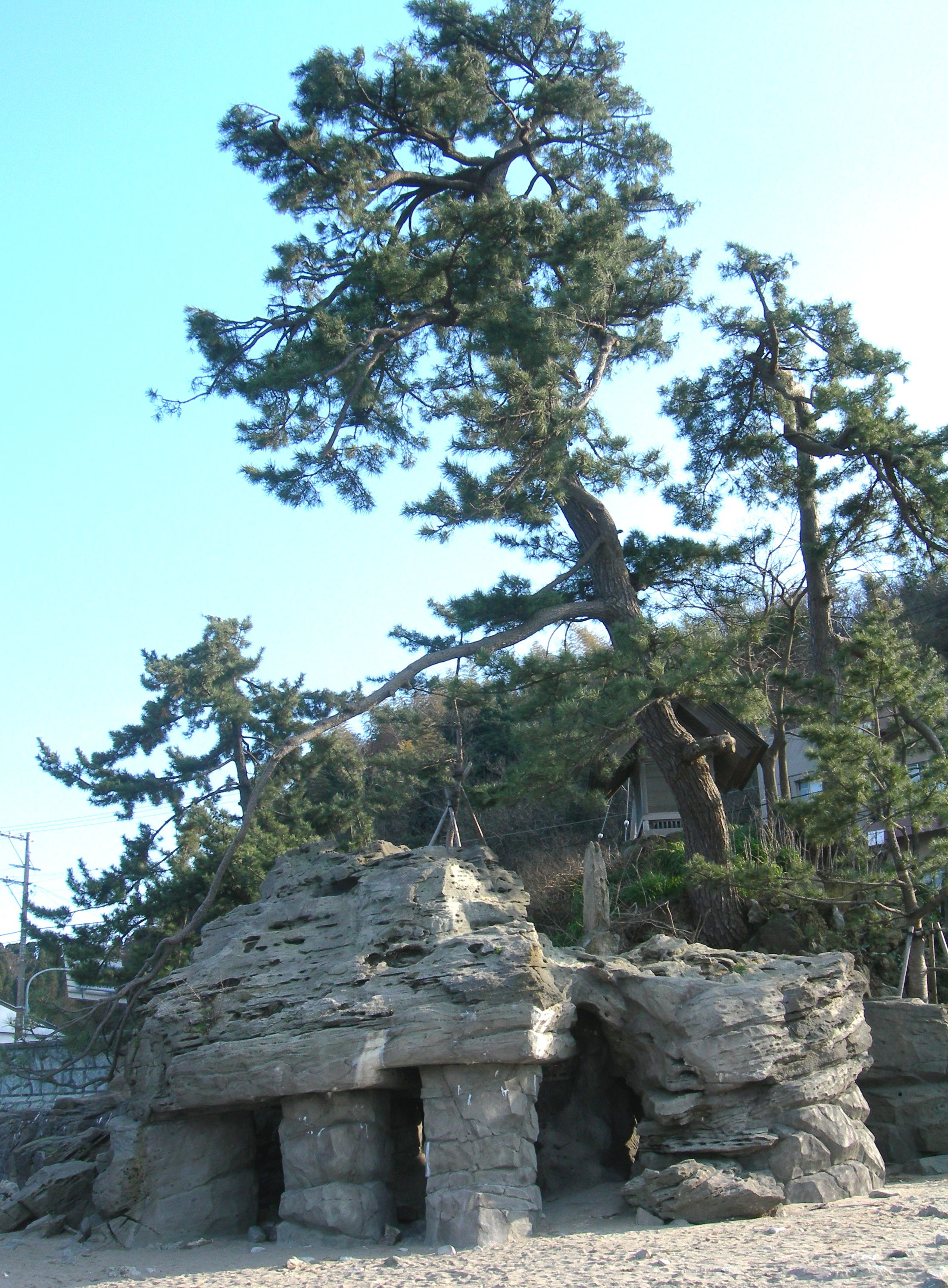 義経岩（よしつねいわ）、富山県高岡市の雨晴海岸の砂浜にある大岩